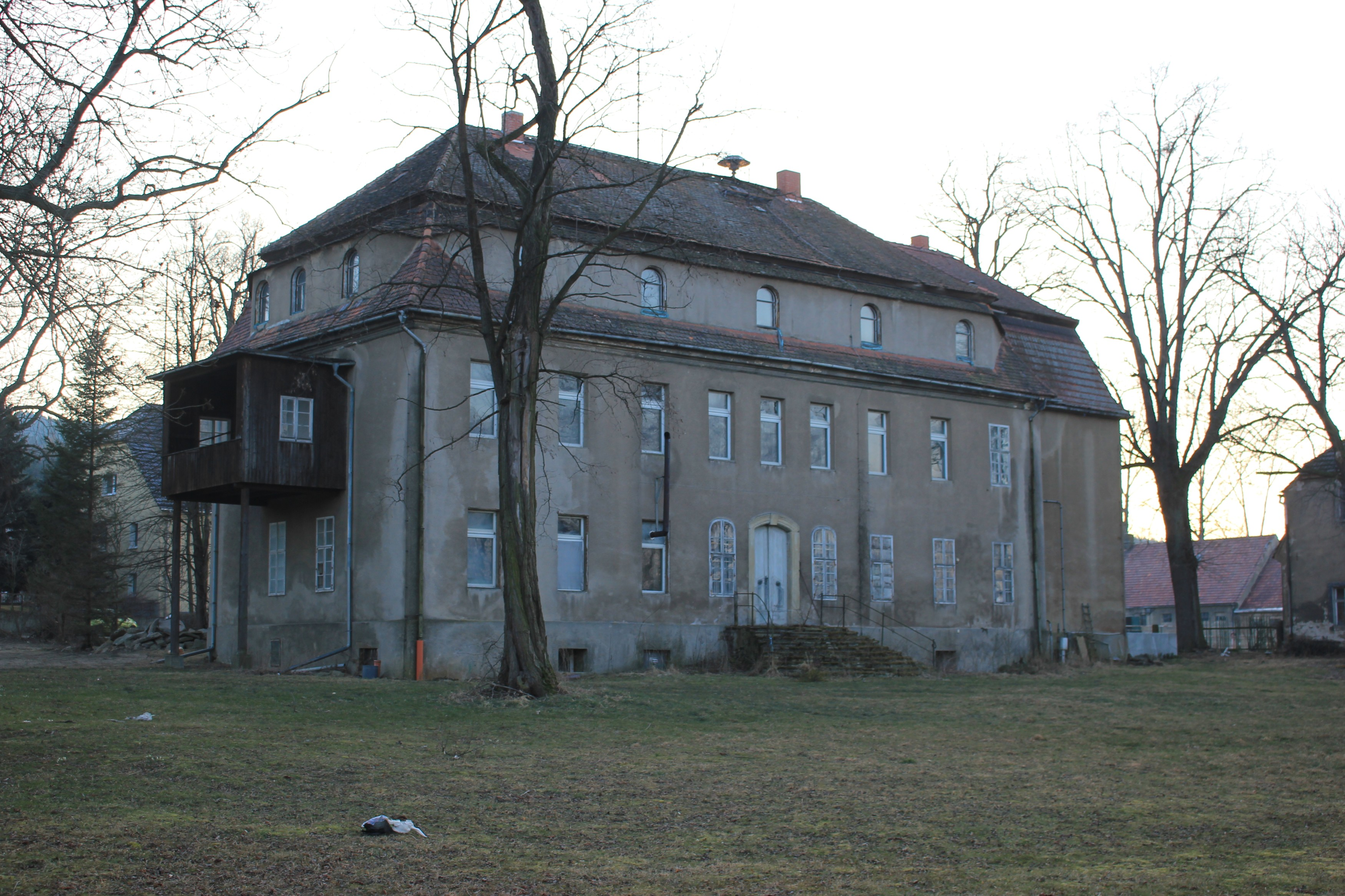 Hornjoserbsce: Ryćerkubło w Lejnje.